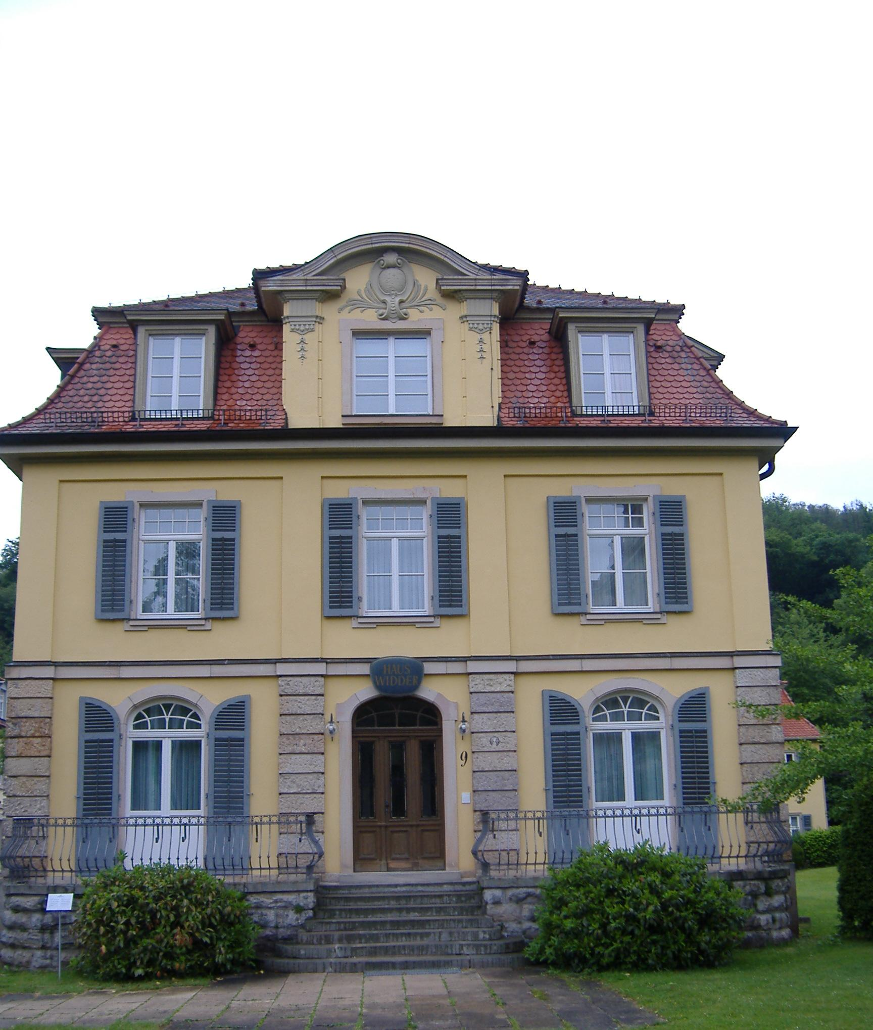 Haus Widder Staatsbad Bad Brückenau